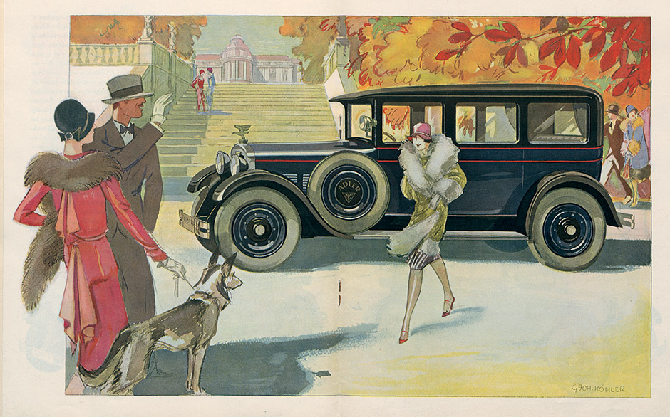 Illustration aus: Der Adler Standard 6. Prospekt, Frankfurt um 1930